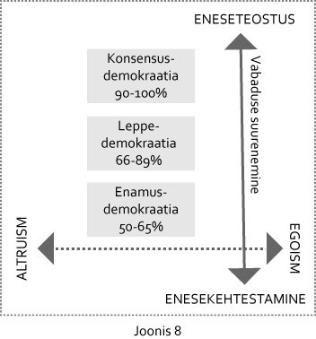 Demokraatia vormid vabaduse teljel. Paigutus sõltub sellest, kui suureosa kodanike arvamust arvestatakse otsuse langetamisel.